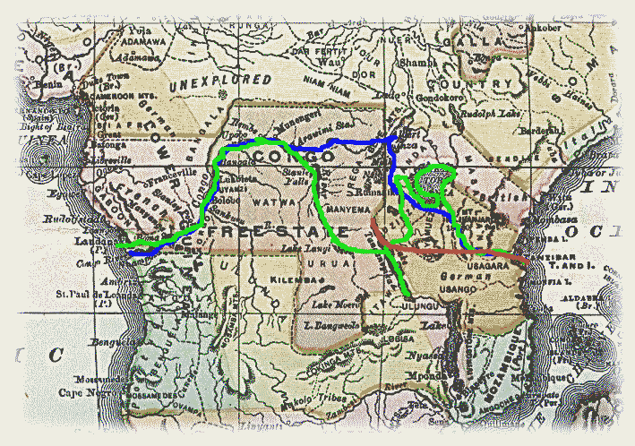 De routes van Henry Morton Stanley. Rood: 1871-1872Groen: 1874-1877Blauw: 1888-1889Reis stroomopwaarts de Kongo van 1879-1884 niet aangegeven. Gemaakt door Andre Engels met als ondergrond een kaart uit 1890. Vrij bruikbaar met bronvermelding.